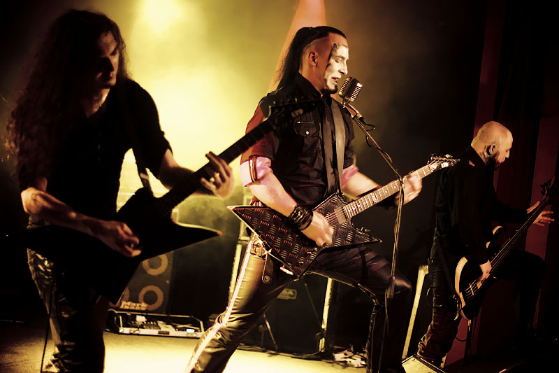 Vesania, Wrocław, Firlej, 13.05.2011